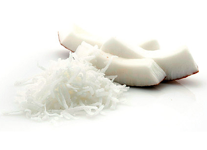 Coco rallado miniatura